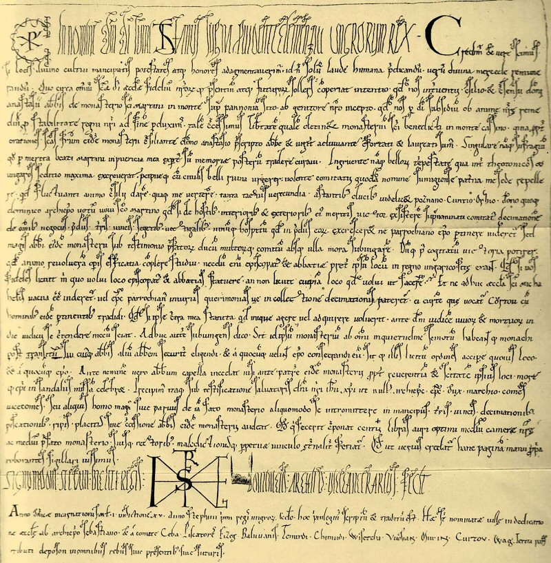 A pannonhalmi apátság alapitó oklevele.